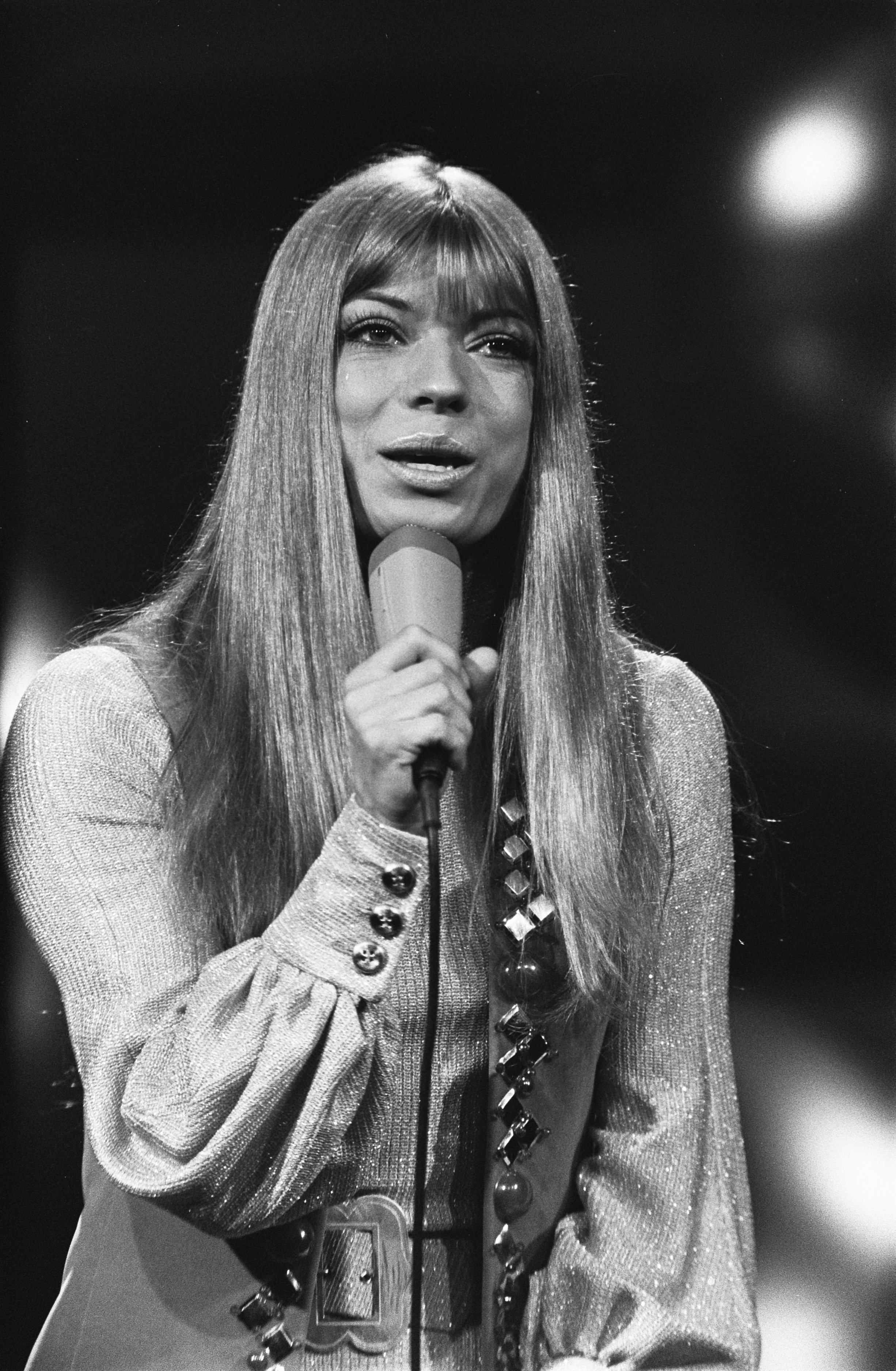 Collectie / Archief : Fotocollectie Anefo Reportage / Serie : Eurovisie Songfestival 1970 in RAI te Amsterdam Beschrijving : Katja Ebstein (Duitsland) Datum : 21 maart 1970 Locatie : Amsterdam Trefwoorden : artiesten, songfestivals, songfestivals, zangers Persoonsnaam : Ebstein, Katja Instellingsnaam : Eurovisie Song Festival Fotograaf : Koch, Eric / Anefo Auteursrechthebbende : Nationaal Archief Materiaalsoort : Negatief (zwart/wit) Nummer archiefinventaris : bekijk toegang 2.24.01.05 Bestanddeelnummer : 923-3699 Reacties Geplaatst door Musiclady op 28 juli 2016 - 10:03. NB. Zij zong het liedje 'Wunder gibt es immer wieder" waarmee ze de 3-e plaats behaalde op het 15-e Eurovisie Songfestival